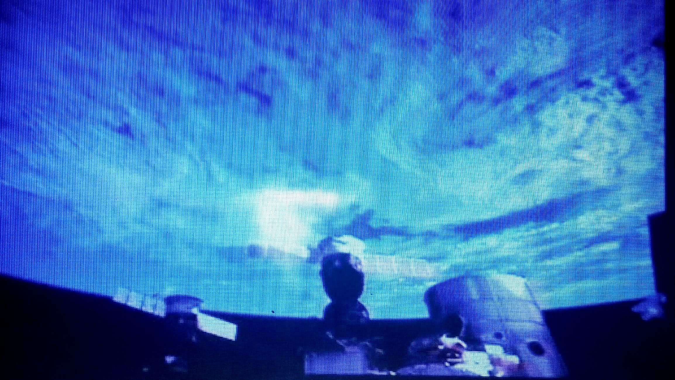 צולם בחדר הבקרה של הAMS 02 בCERN, בתמונה גלאי הAMS 02 בתחנת החלל הבינלאומית